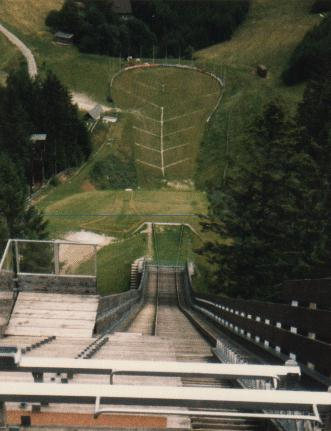 Blick von der Schanze